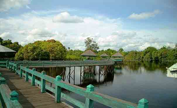 Danau Tahai